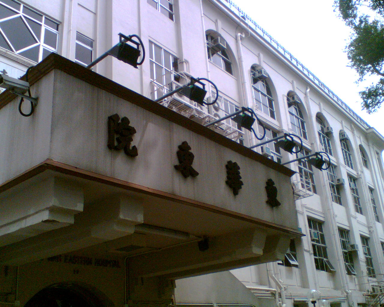 中文（香港）: 東華東院。